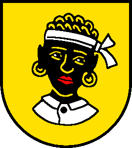 Das Gemeindewappen geht auf das ehemalige Vogteiwappen zurück.